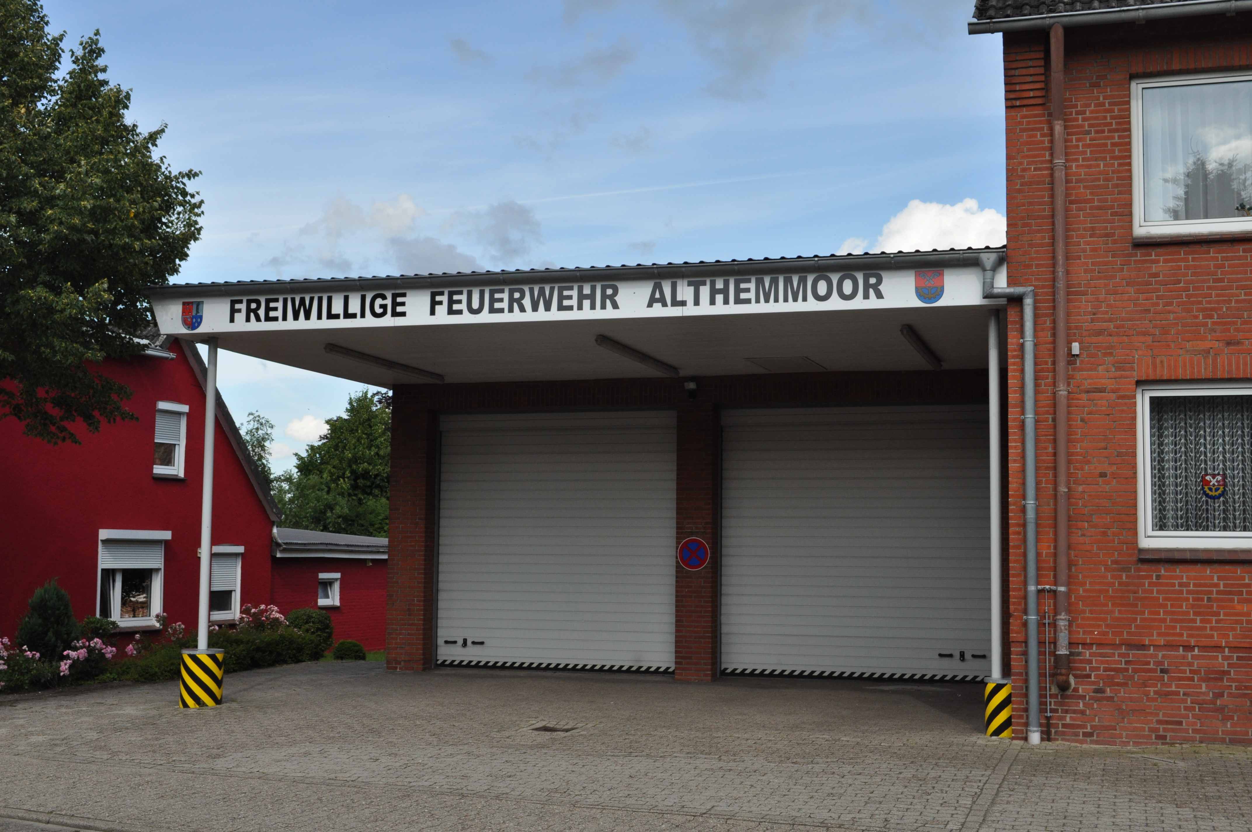 Freiwillige Feuerwehr Althemmoor in Hemmoor.